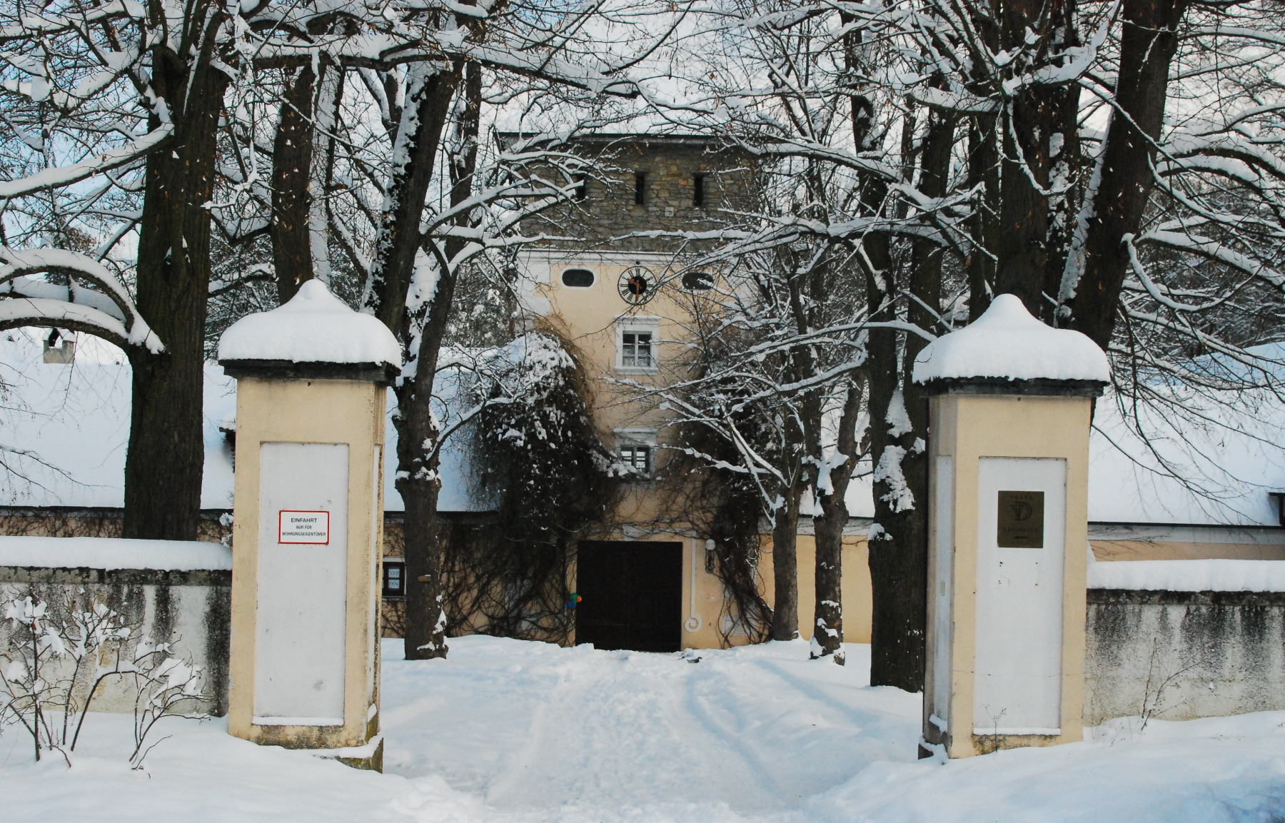 Schloss Primmersdorf bei Drosendorf an der Thaya